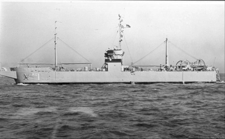 USS Portunus (ARC-1)